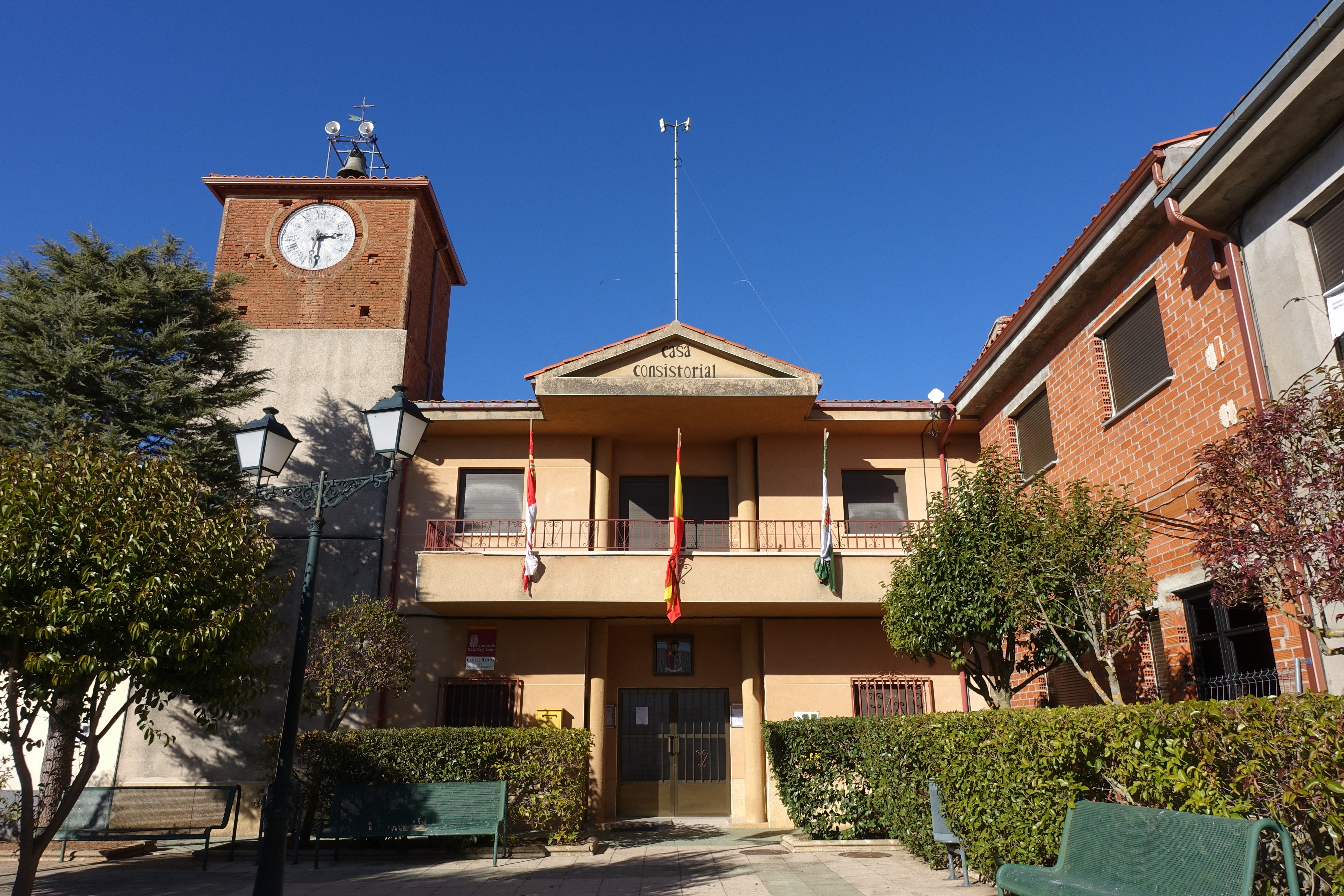 Casa consistorial de Sepulcro-Hilario (Salamanca, España).